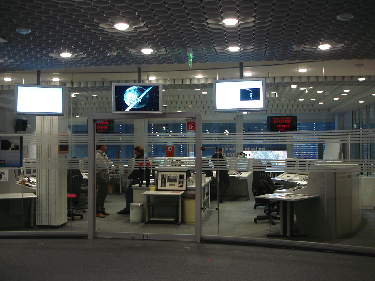 Salle de contrôle de la sonde Rosetta à l'ESOC, à Darmstadt, pendant l'ESB3 de novembre 2009.